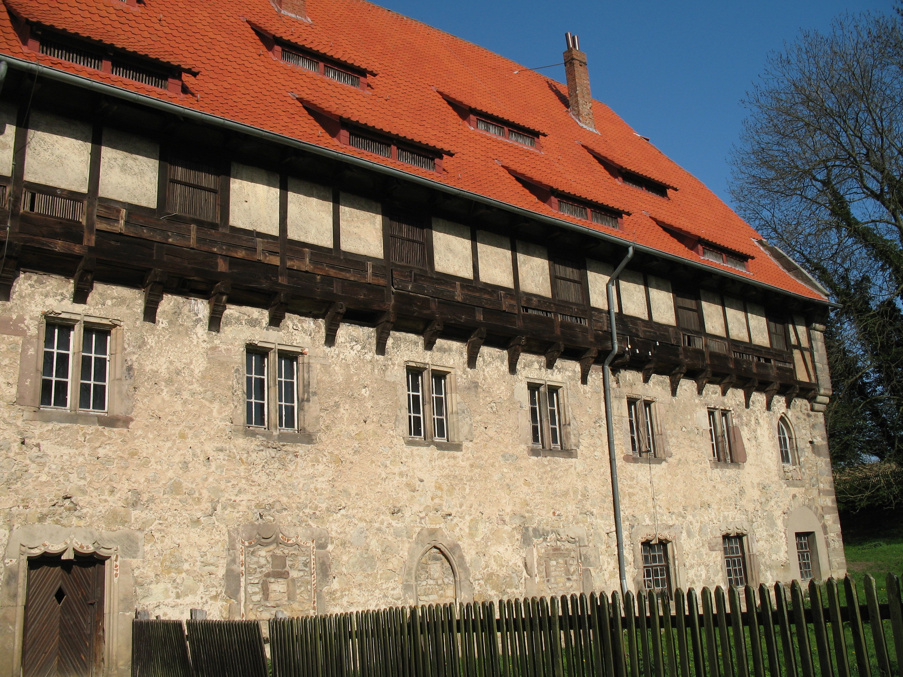 Mariengarten, gotisches Klosterhaus mit 24 Nonnenzellen, Landkreis Göttingen, Niedersachsen